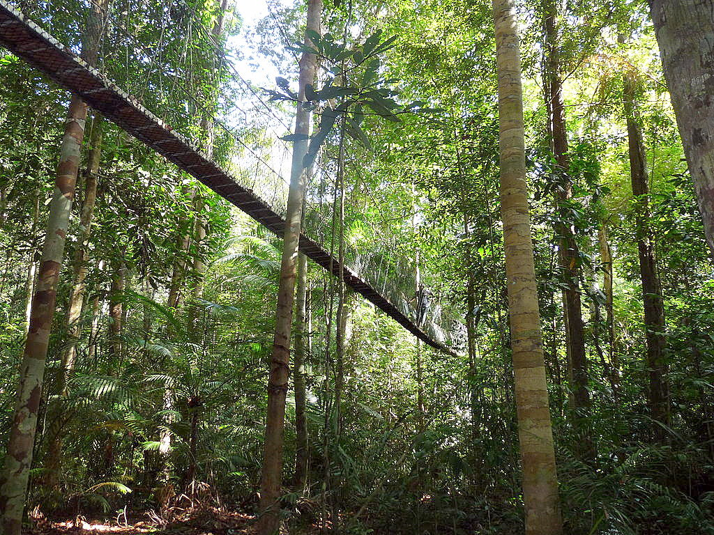 Taman Negara (Park Narodowy Malezji)